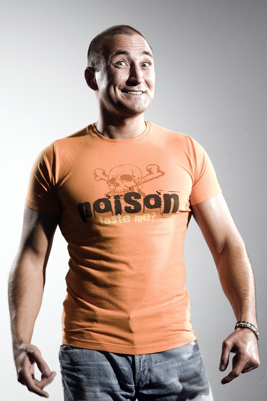 Pressefoto Murat Topal